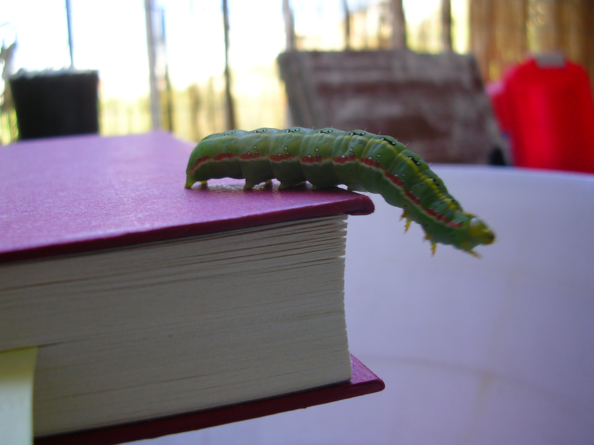 larva of Xylena exsoleta